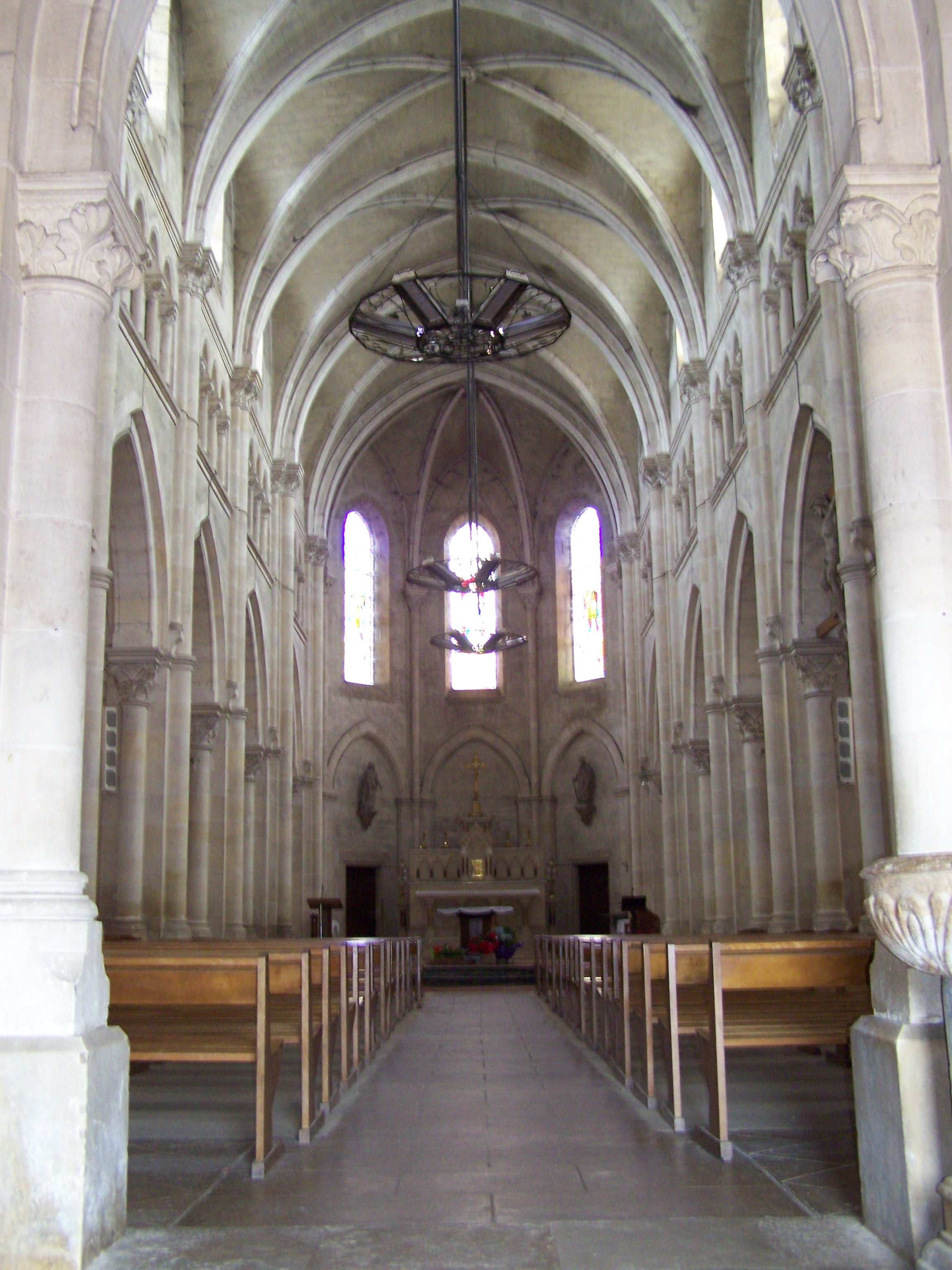 Nef de l'église Saint-Romain de Château-Chinon (Nièvre, France).